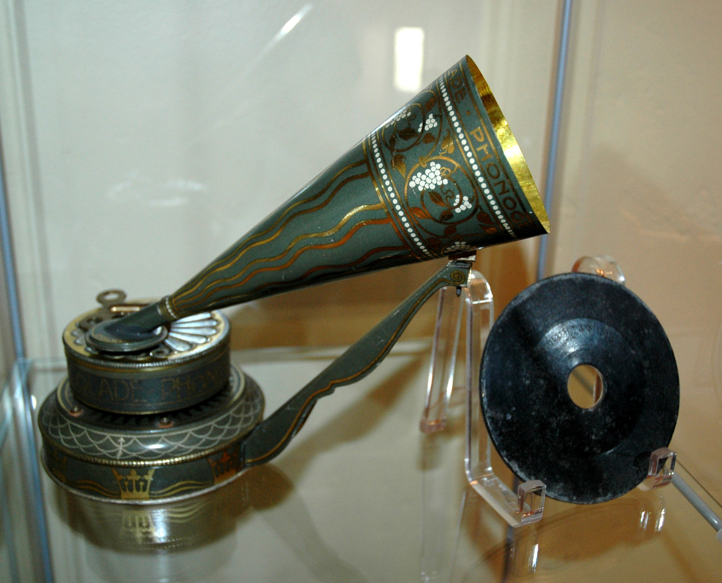 Stollwerck-Phonograf "Eureka" von 1902